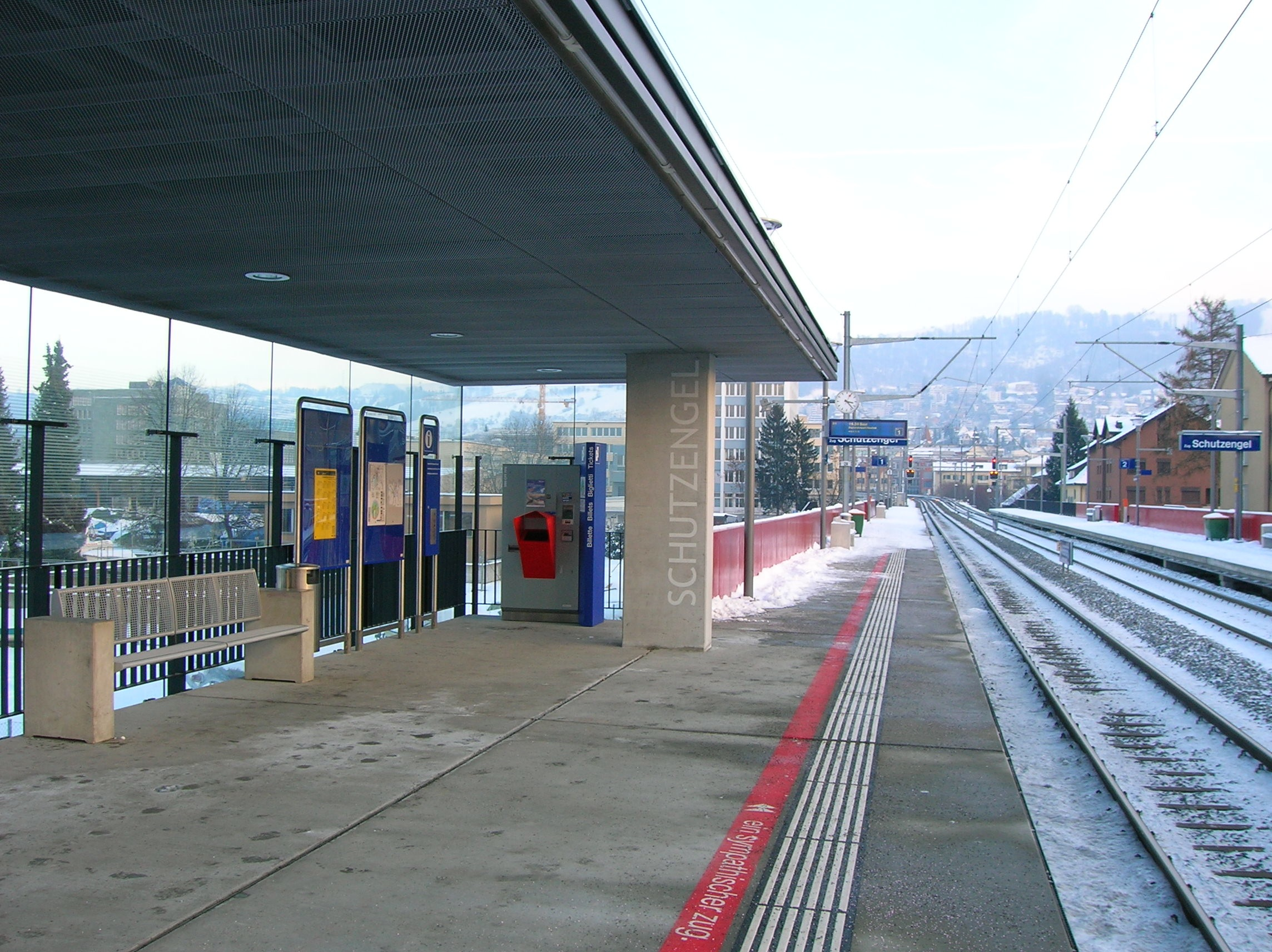 Stadtbahn Zug Stations 17